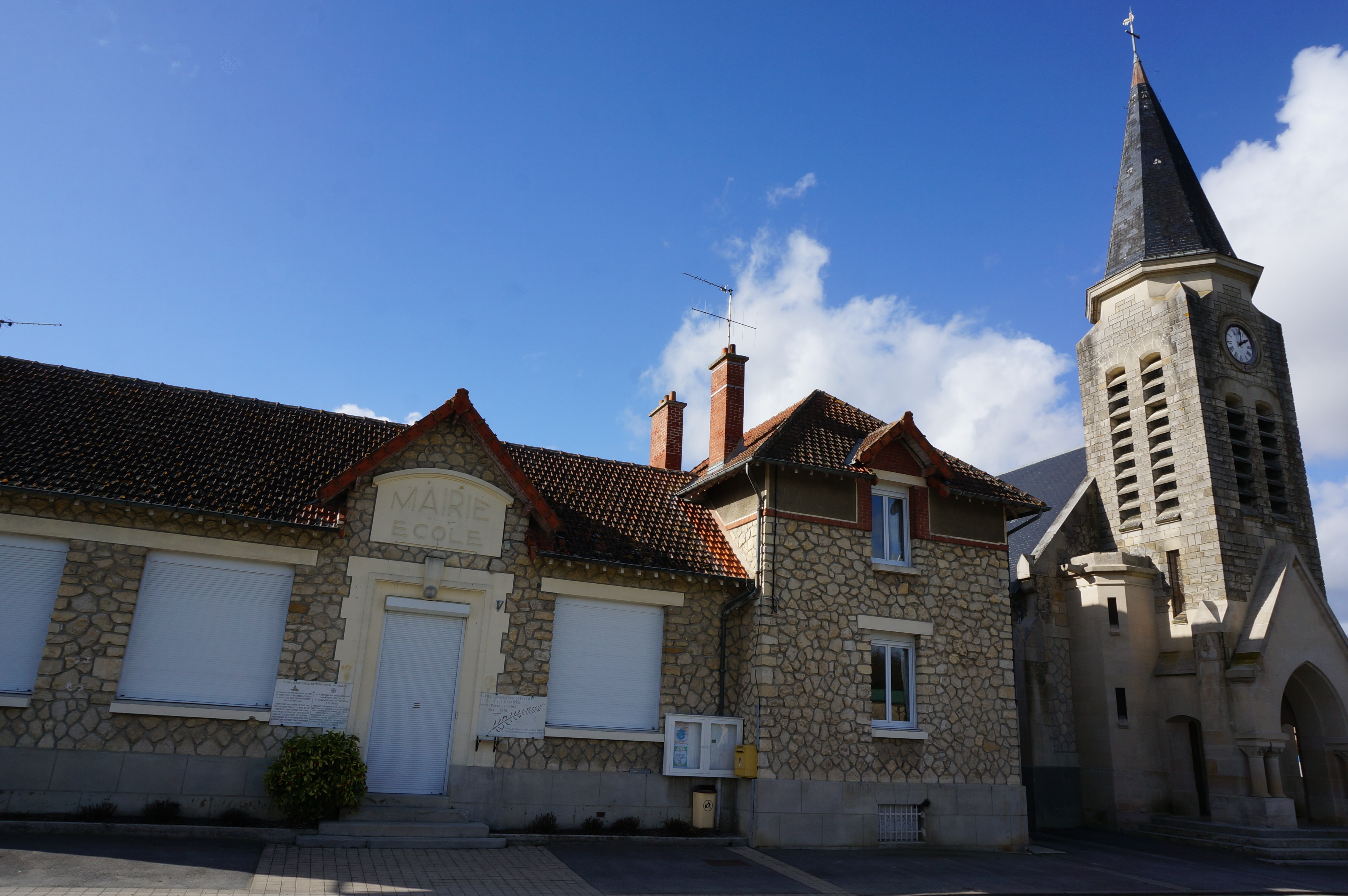 dans le village de La Ville-aux-Bois-lès-Pontavert.